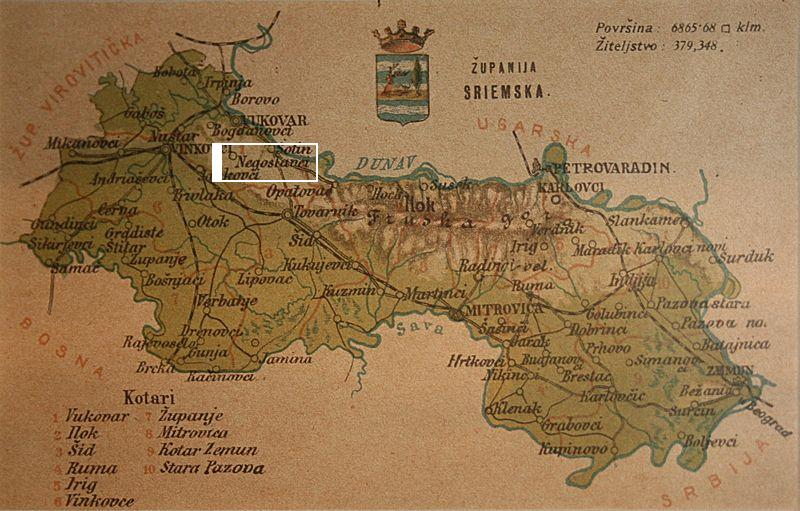 Zemljovidi županija na razglednicama oko 1900. godine